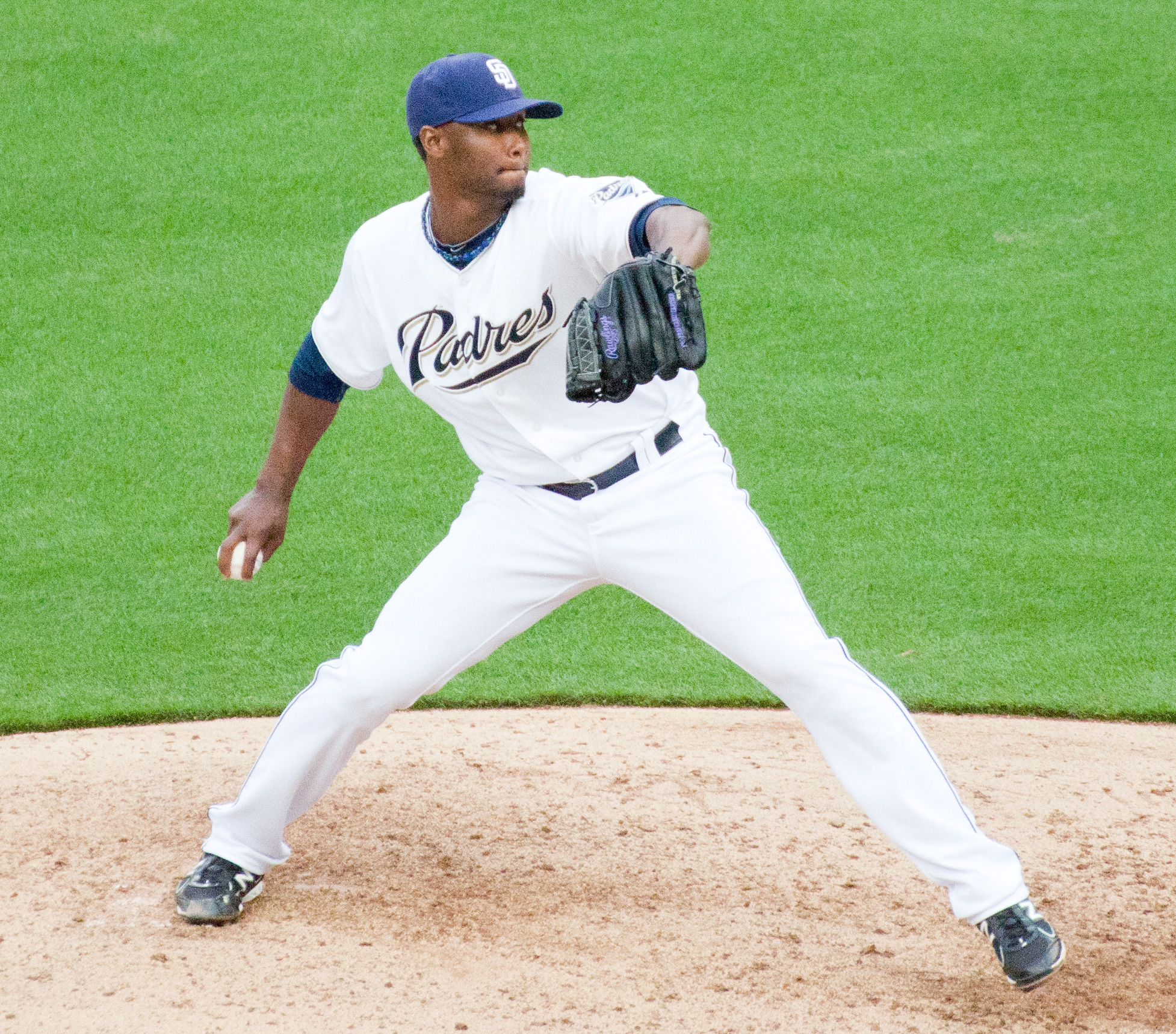 Samuel Deduno